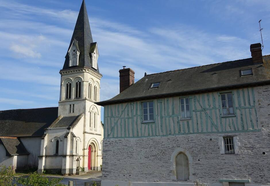 Vieux bourg de chatillon sur seiche